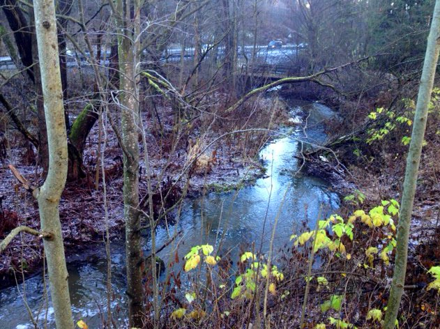 Gjersrudbekken ved Ljabruveien